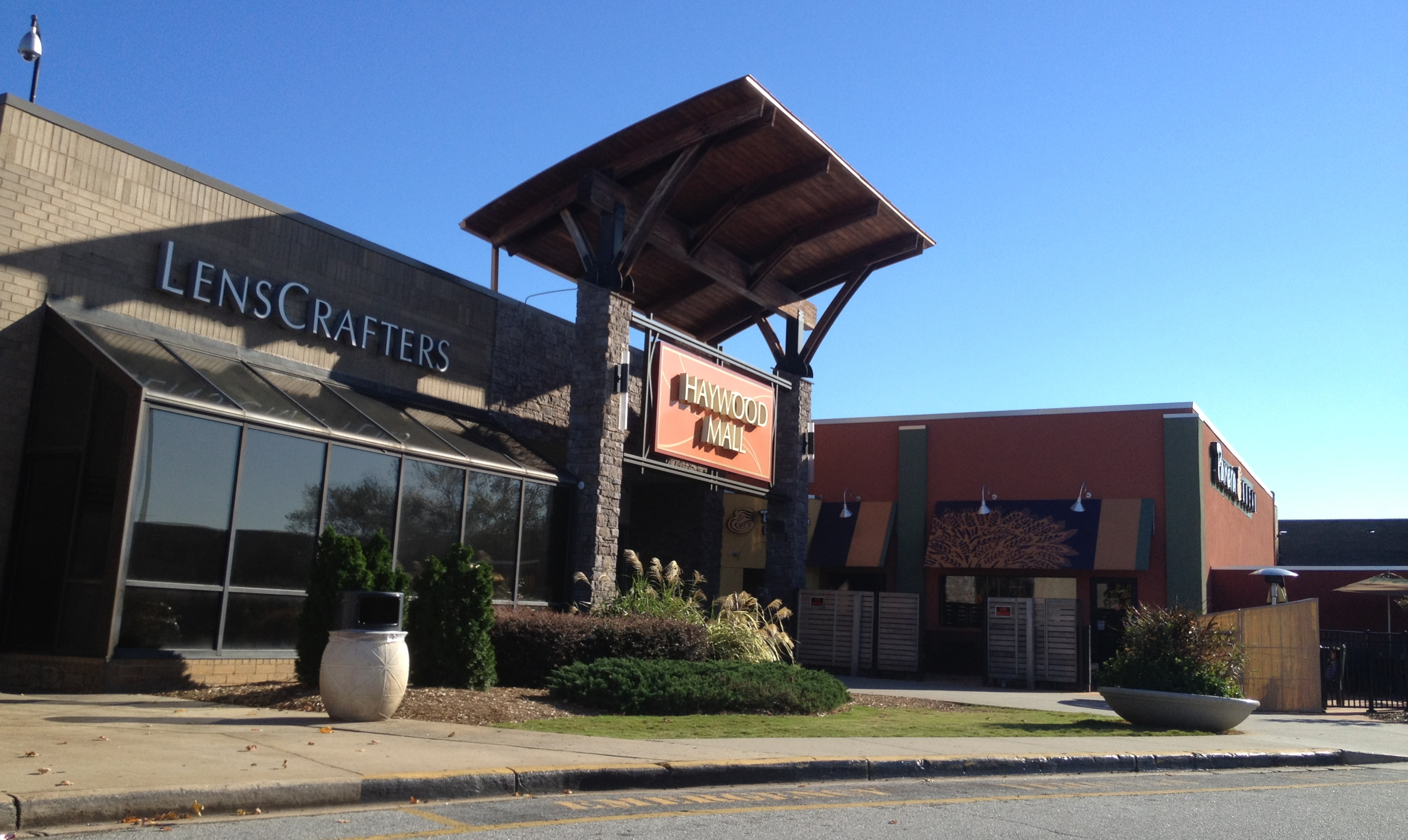 Haywood Mall